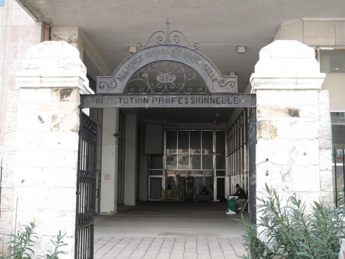 מה שנשאר מבי"ס כי"ח/אליאנס. הכניסה במקומה המקורי.